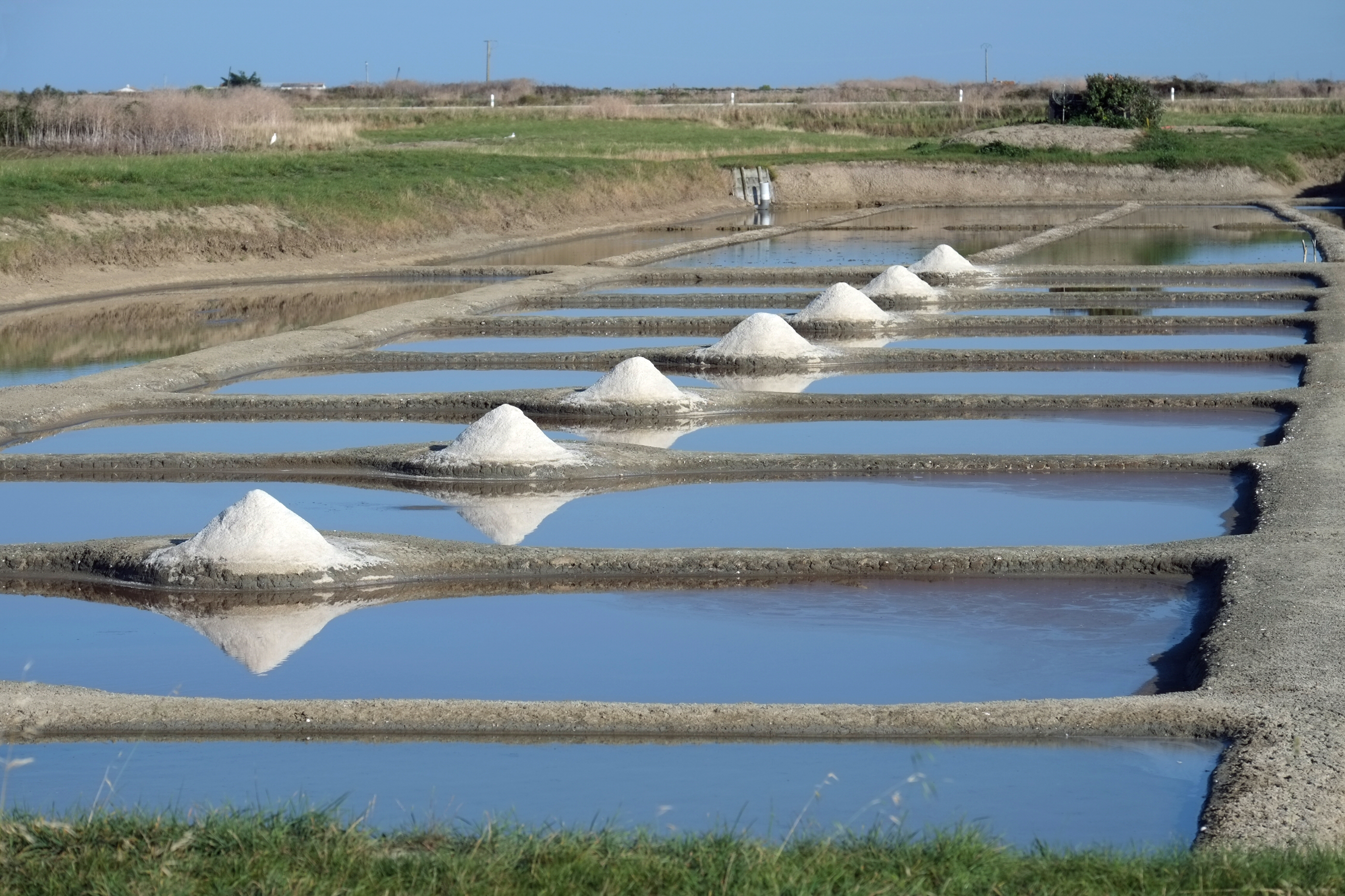 Marais salant à proximité de Noirmoutier-en-l'Île Vendée France